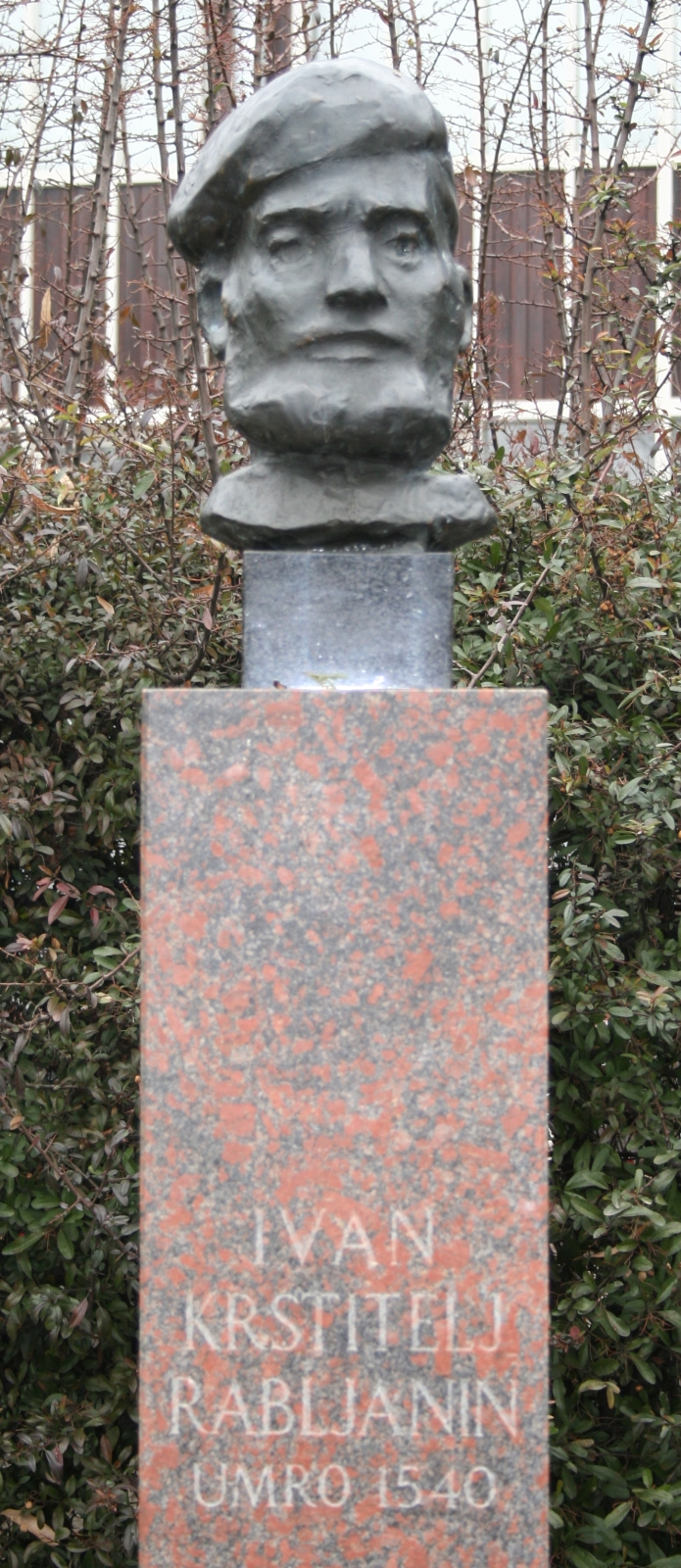 Ivan_Krstitelj_Rabljanin, bista pred Tehničkim muzejem u Zagrebu